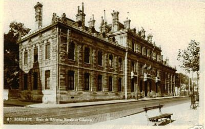 Das Gebäude der Santé Navale in der Nähe des Bahnhofs Saint-Jean ist bis heute unverändert erhalten.